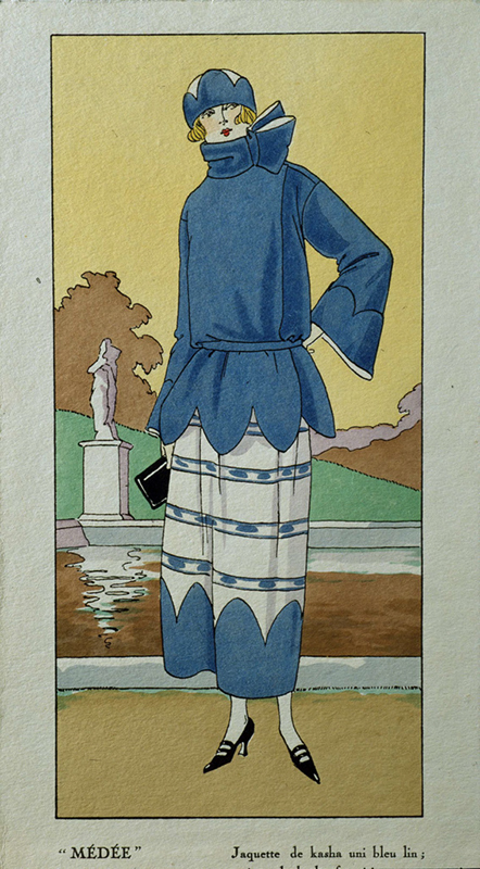 Fransk modeteckning. 1920-tal. "Médée". "Jaquette de kasha uni bleu lin"